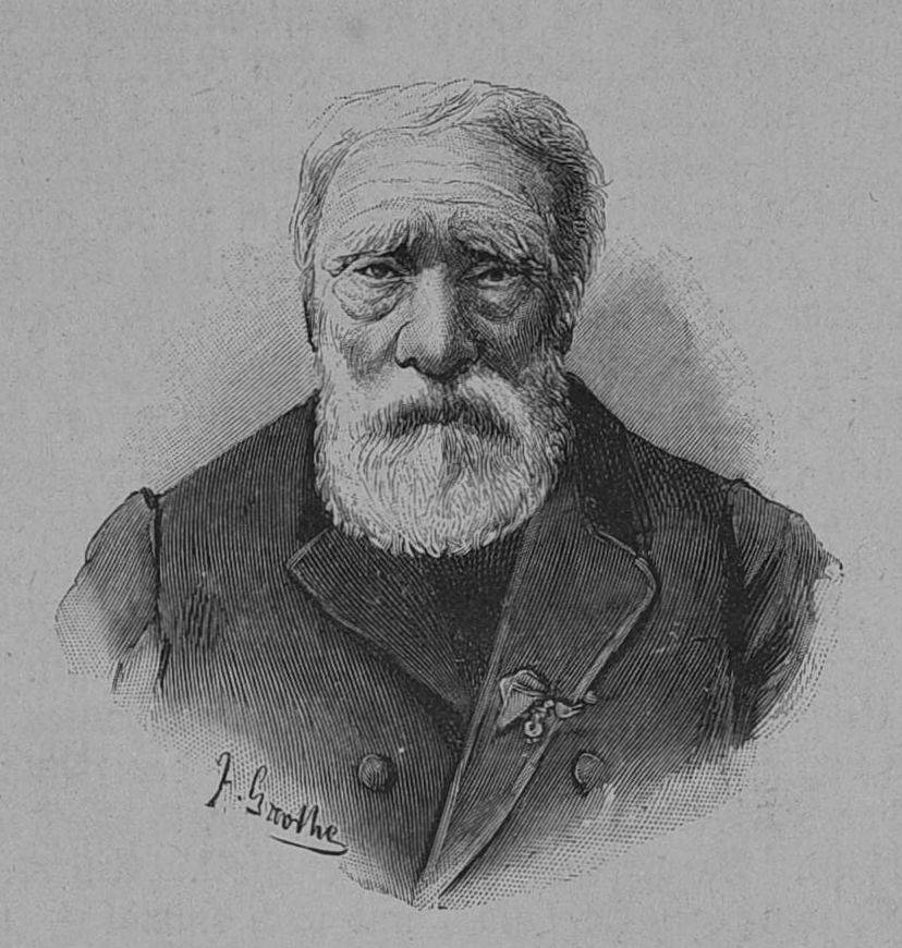 Nicolas Savin, der letzte Lieutenant der Großen Armee. Nach einer Zeichnung von J. Grothe.